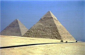 piramides van chufu en chefren van Robert Beunder